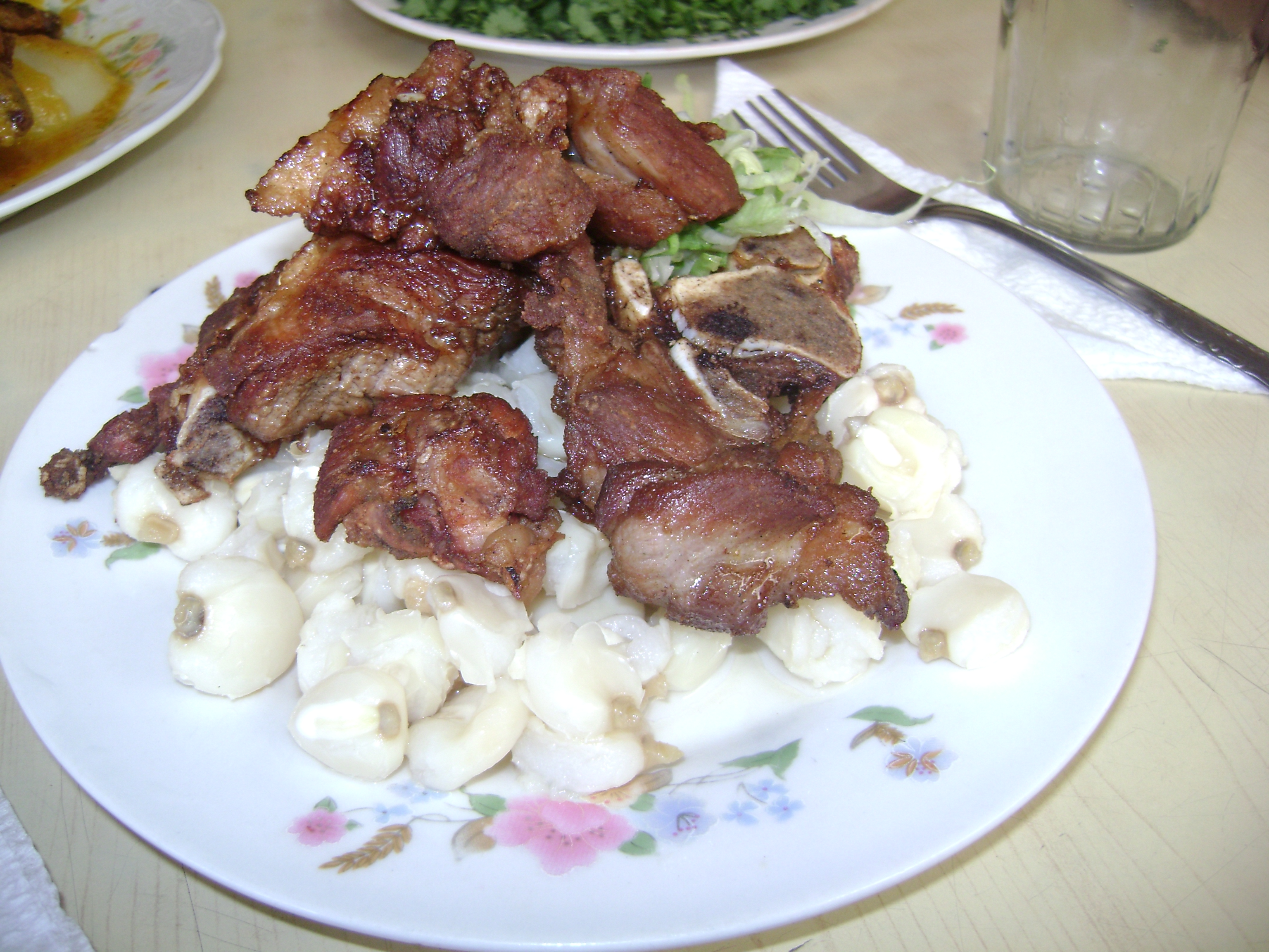 Un plato de chicharrón con mote servido en el Mercado Central de la ciudad de Huaraz, Región Ancash, Perú, agosto 2007.